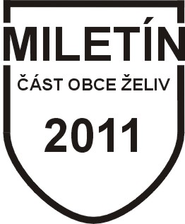 oficiální logo Miletína doprovázející všechny tiskoviny